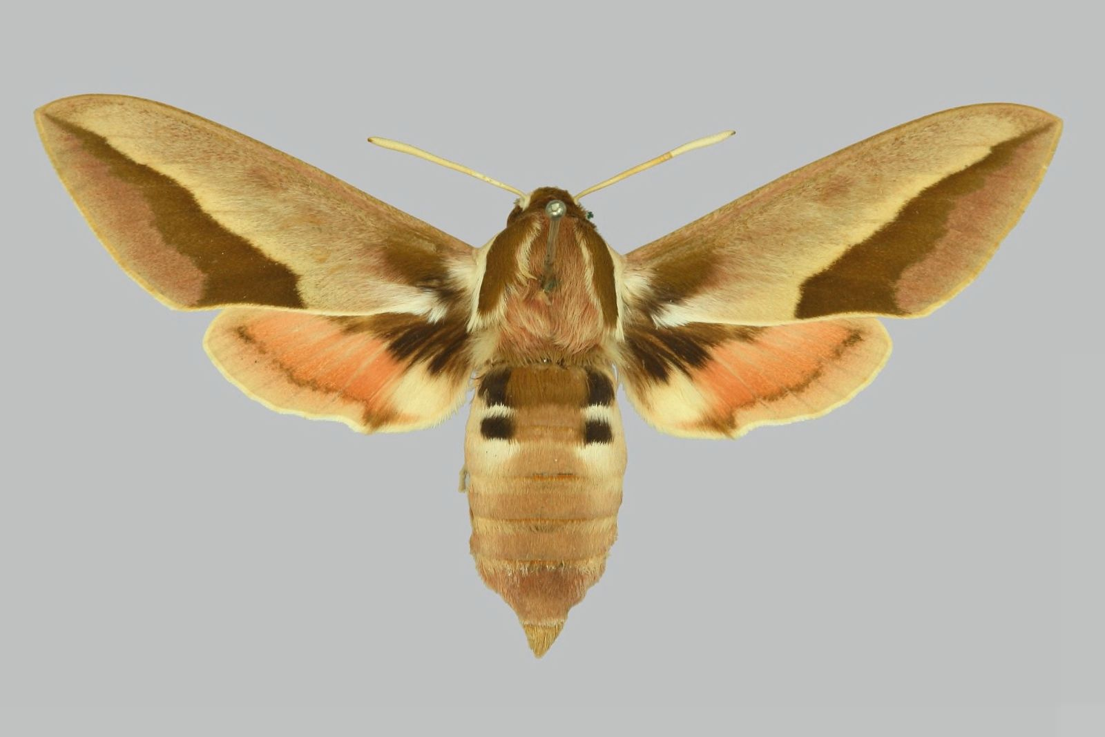 Hyles centralasiae, female, upperside. Turkmenistan, Askhabad